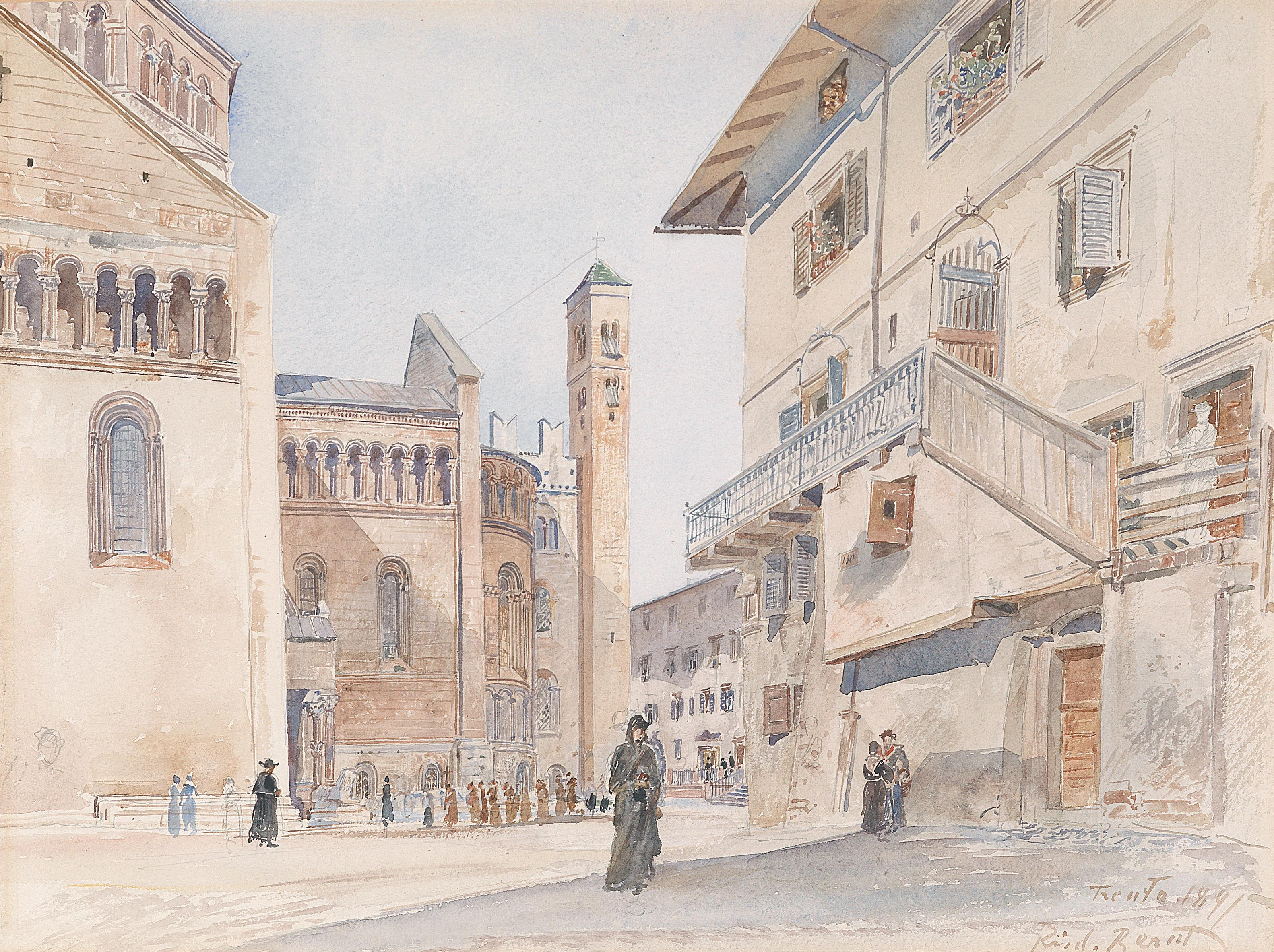 Motiv aus Trient: der Dom San Vigilio, betitelt "Trento", signiert und datiert Rud. Bernt 1891, Aquarell auf Papier, 29 x 39 cm